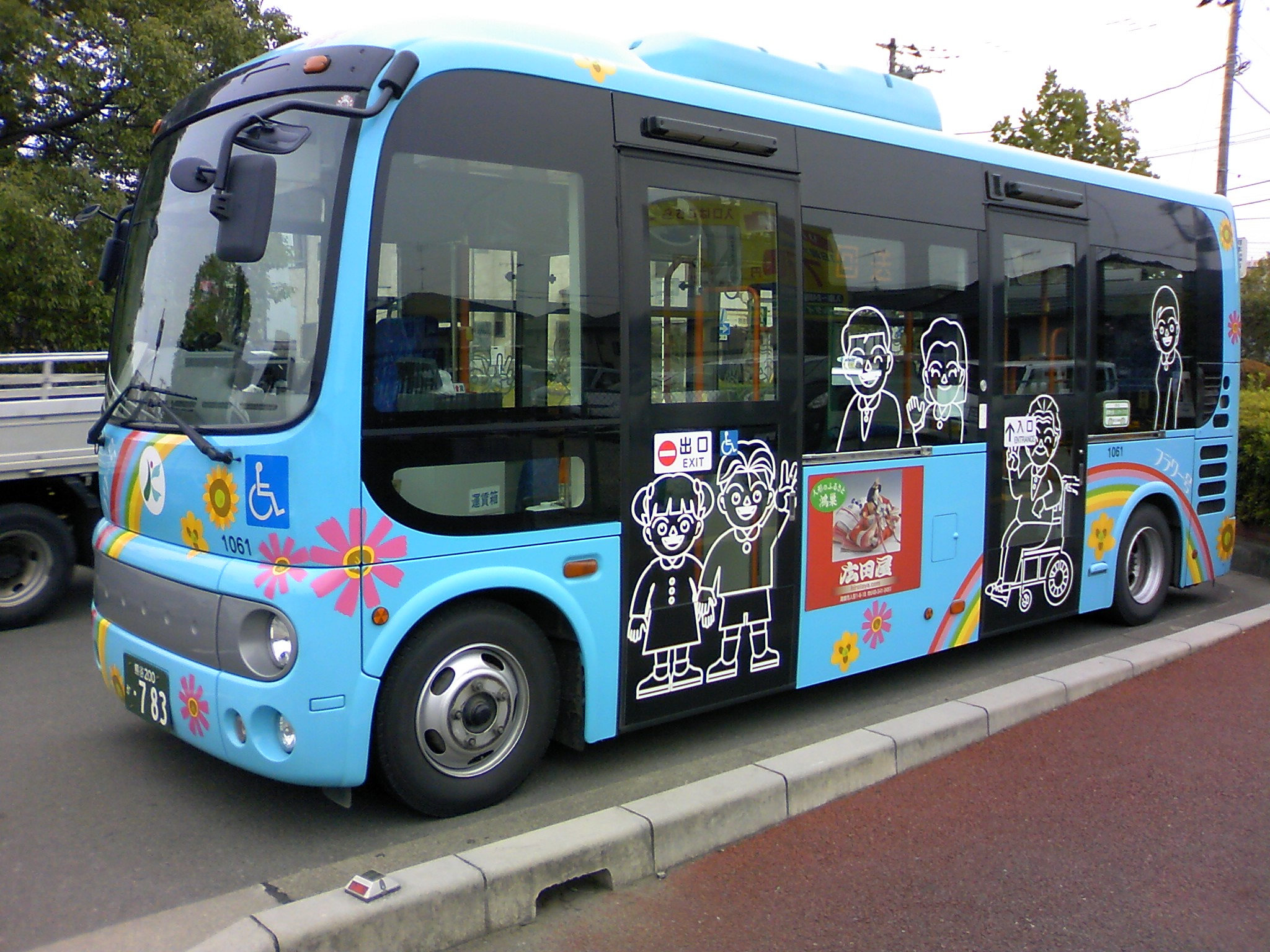 鴻巣市内循環バスのフラワー号